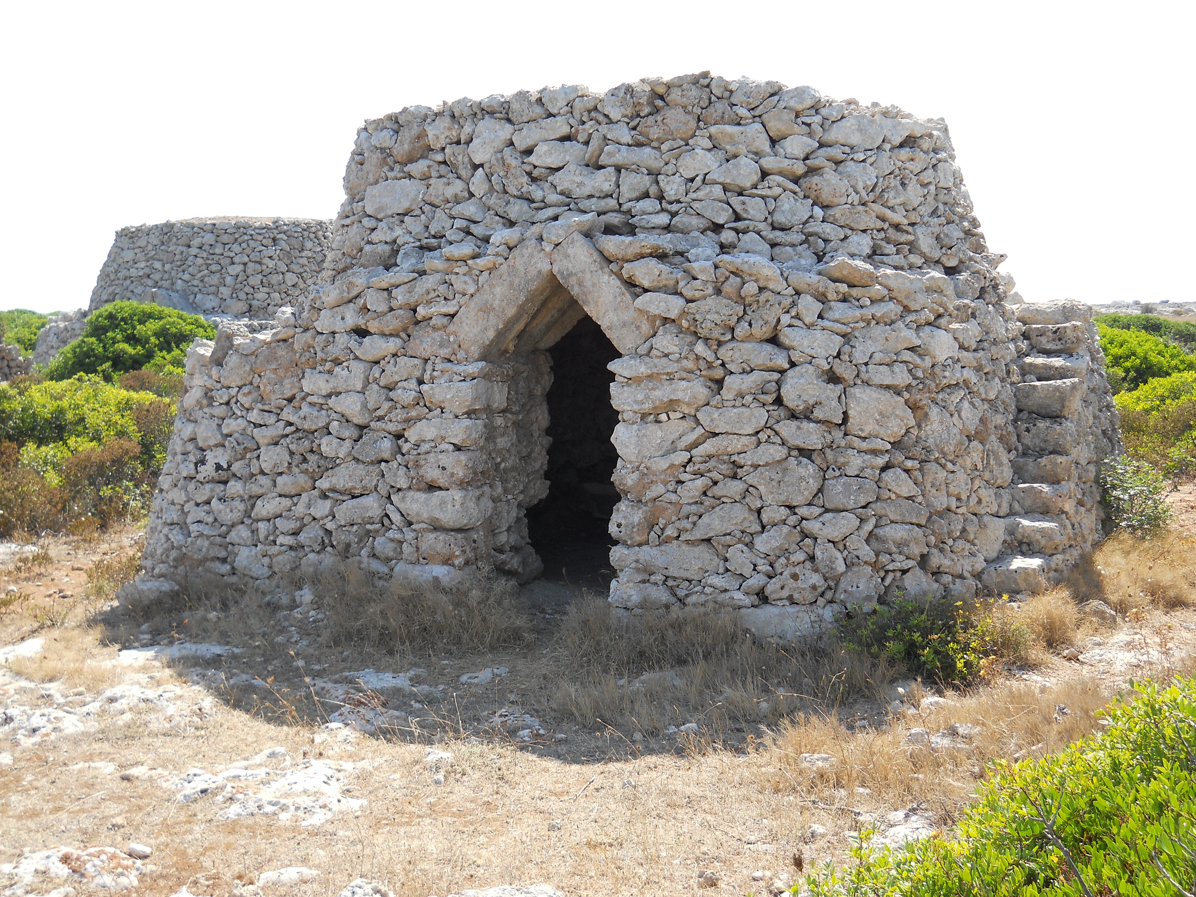 Antica costruzione rurale salentina in località Palude del Capitano.